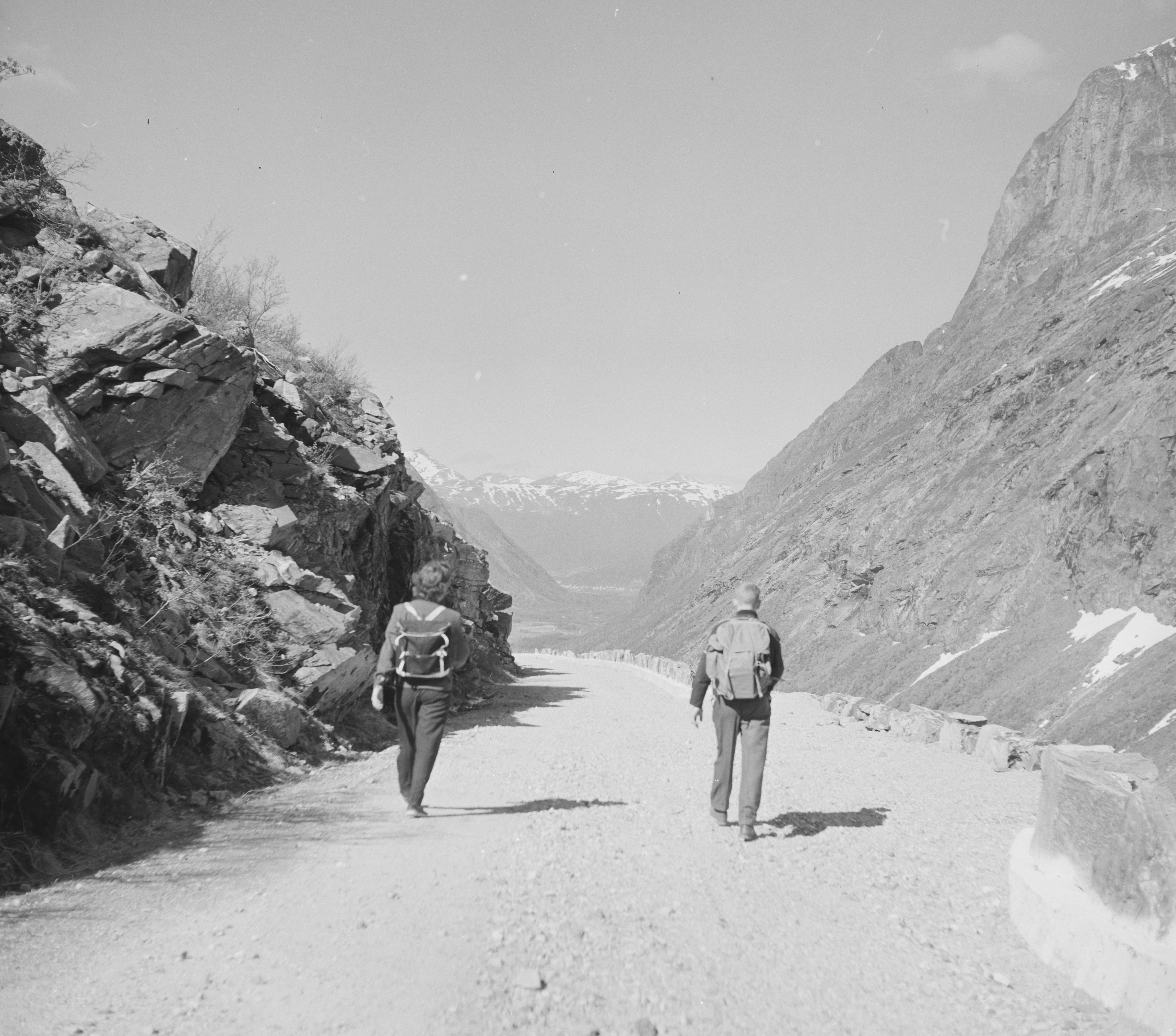 Bildet er hentet fra Nasjonalbibliotekets bildesamling. Anmerkninger til bildet var: Fotograf: E-KQ Isterdalen,Trollstigen, Rauma, Møre og Romsdal